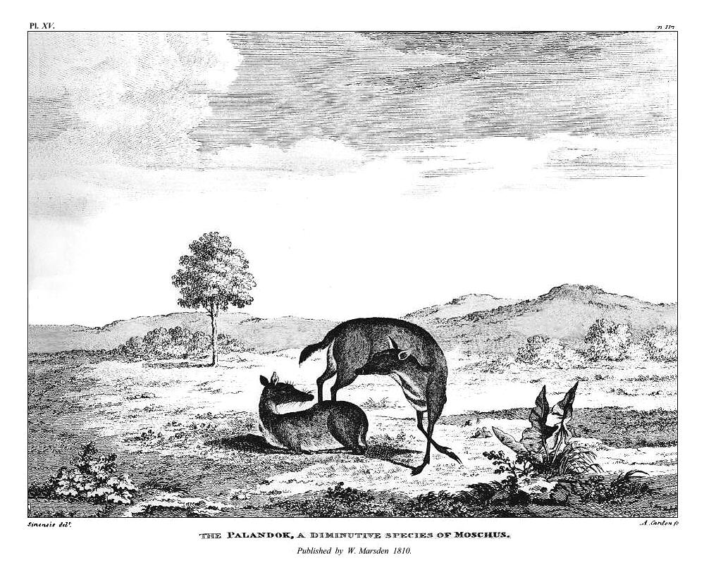 William Marsden: The History of Sumatra. Tafel XV: The Palandok